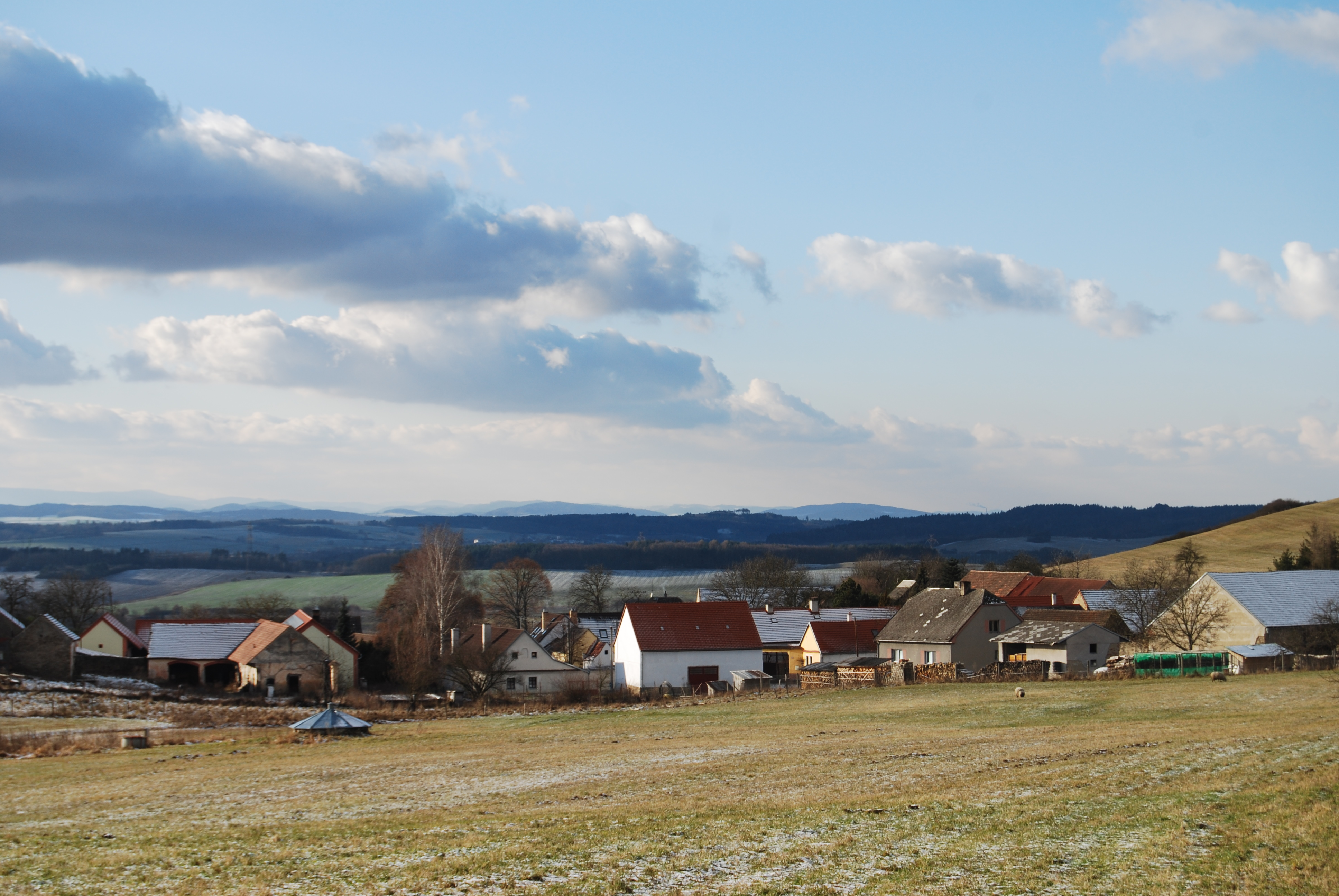 Pohled na část vesnice od křížku. Nuzov je část obce Paseky v okrese Písek. Česká republika.